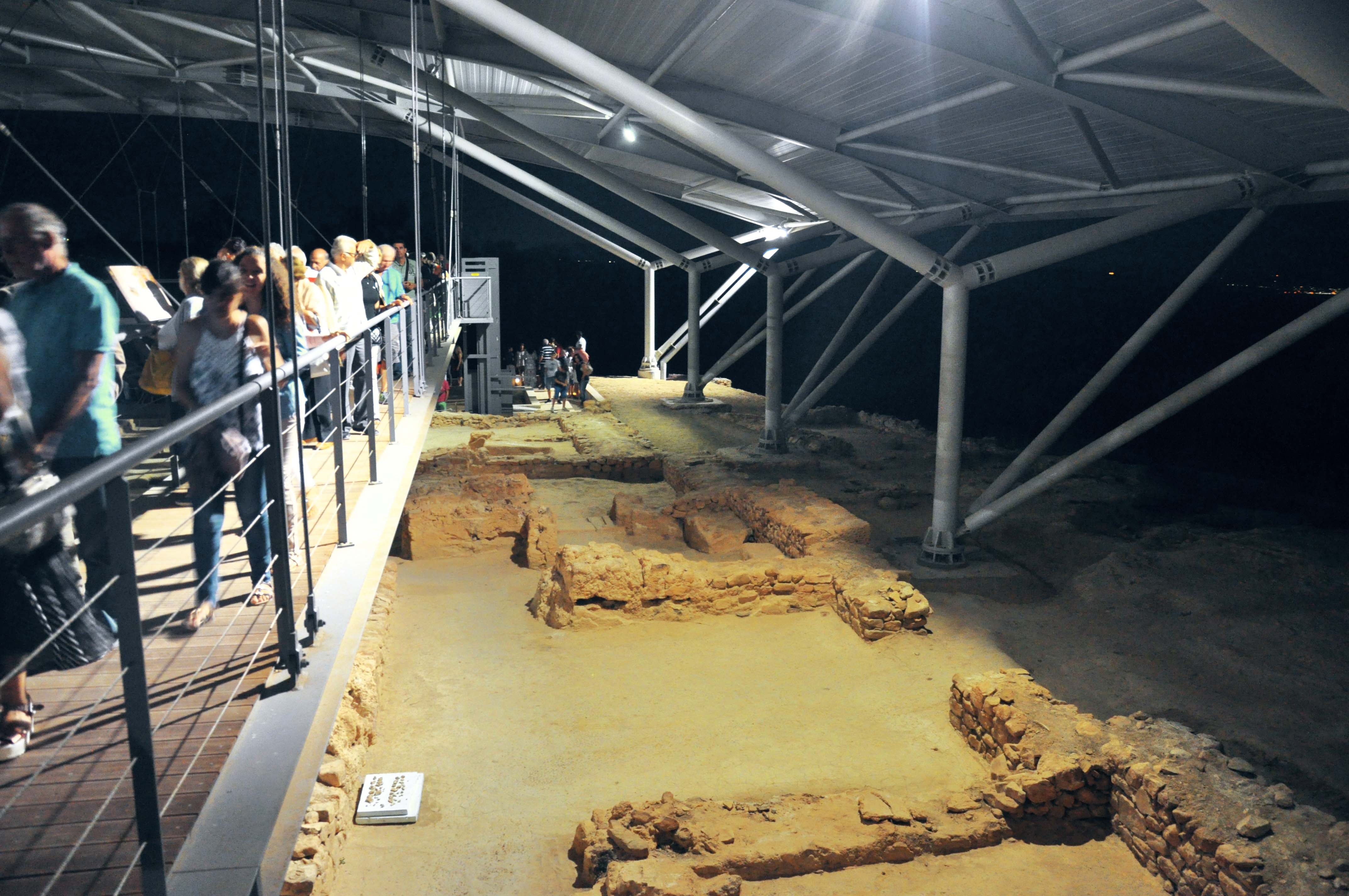 Το νέο στέγαστρο προστασίας κατα το 2016